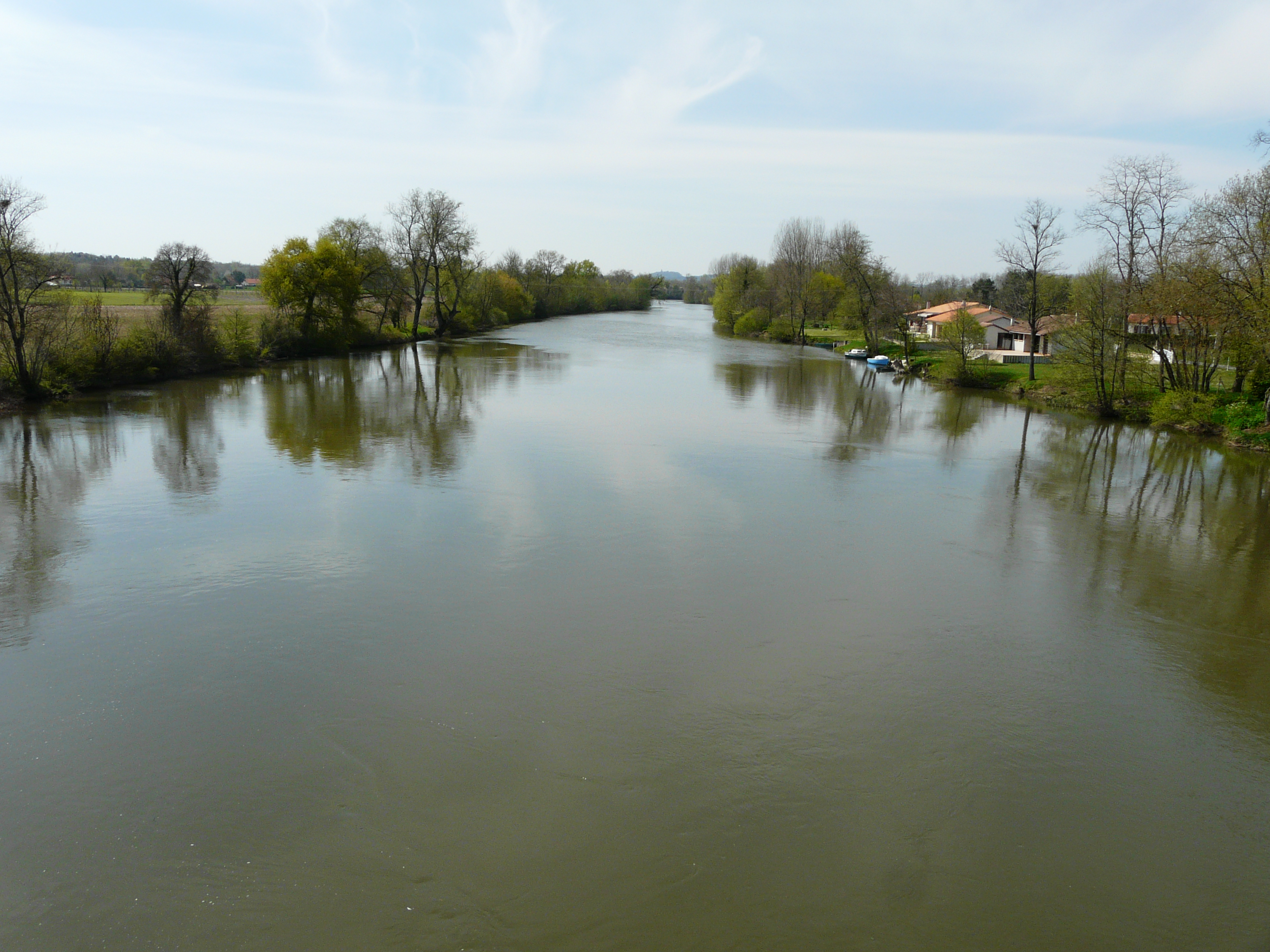 L'Isle en aval du pont de la route départementale 10 entre Moulin-Neuf (à gauche) et Le Pizou (à droite), Dordogne, France.